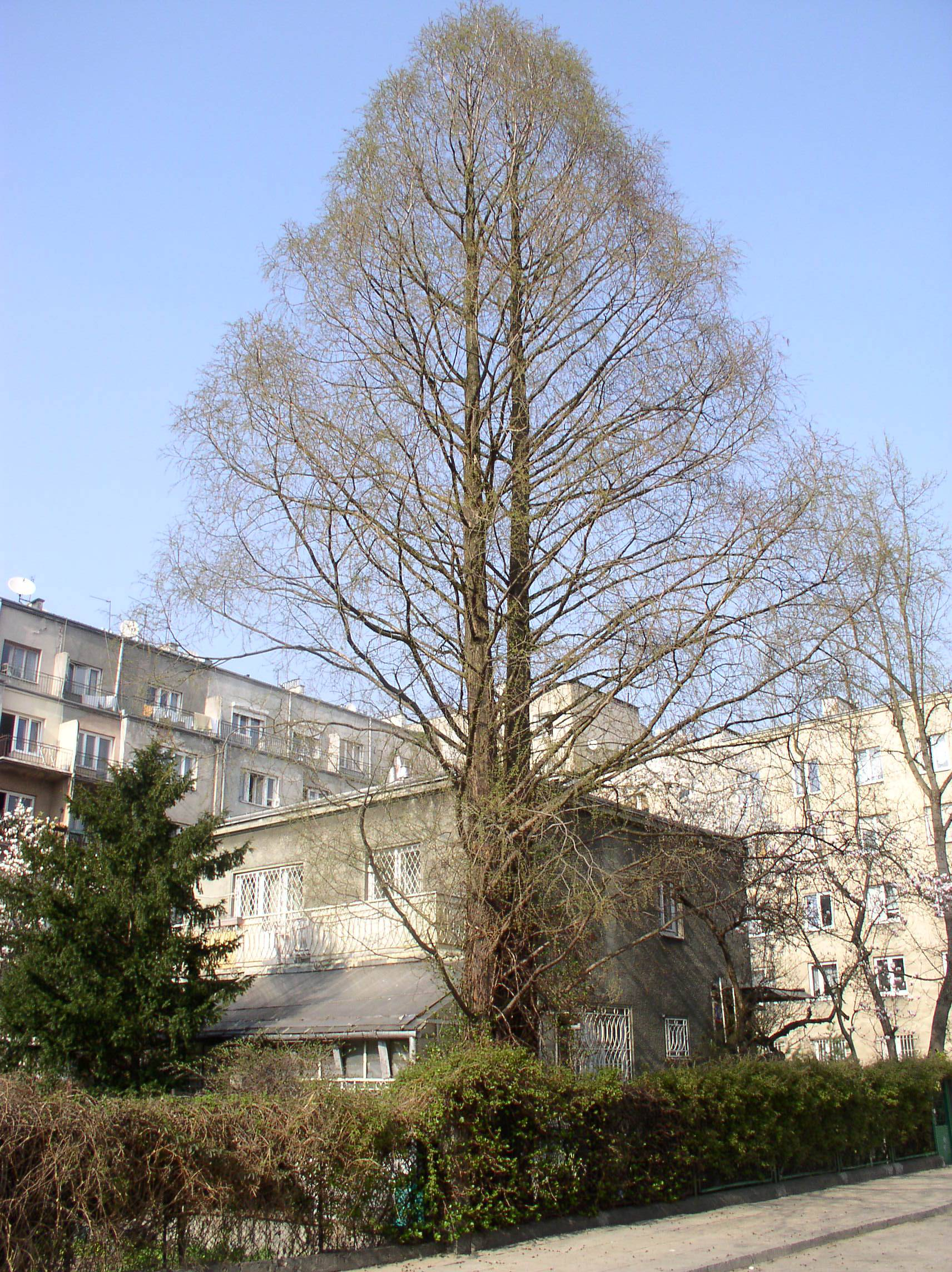 Metasekwoja chińska, ul. Adampolska 13 W-wa